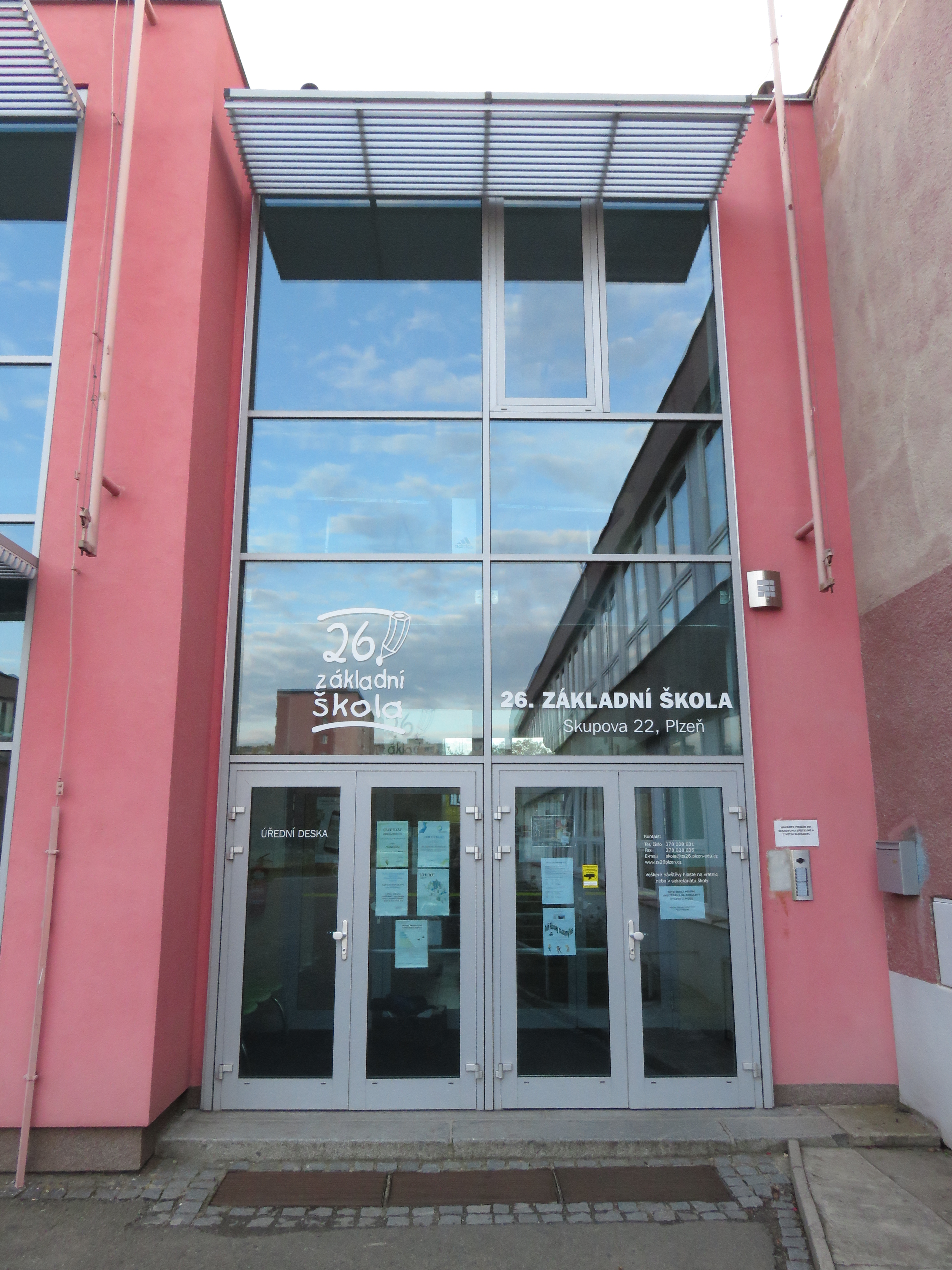 vchod